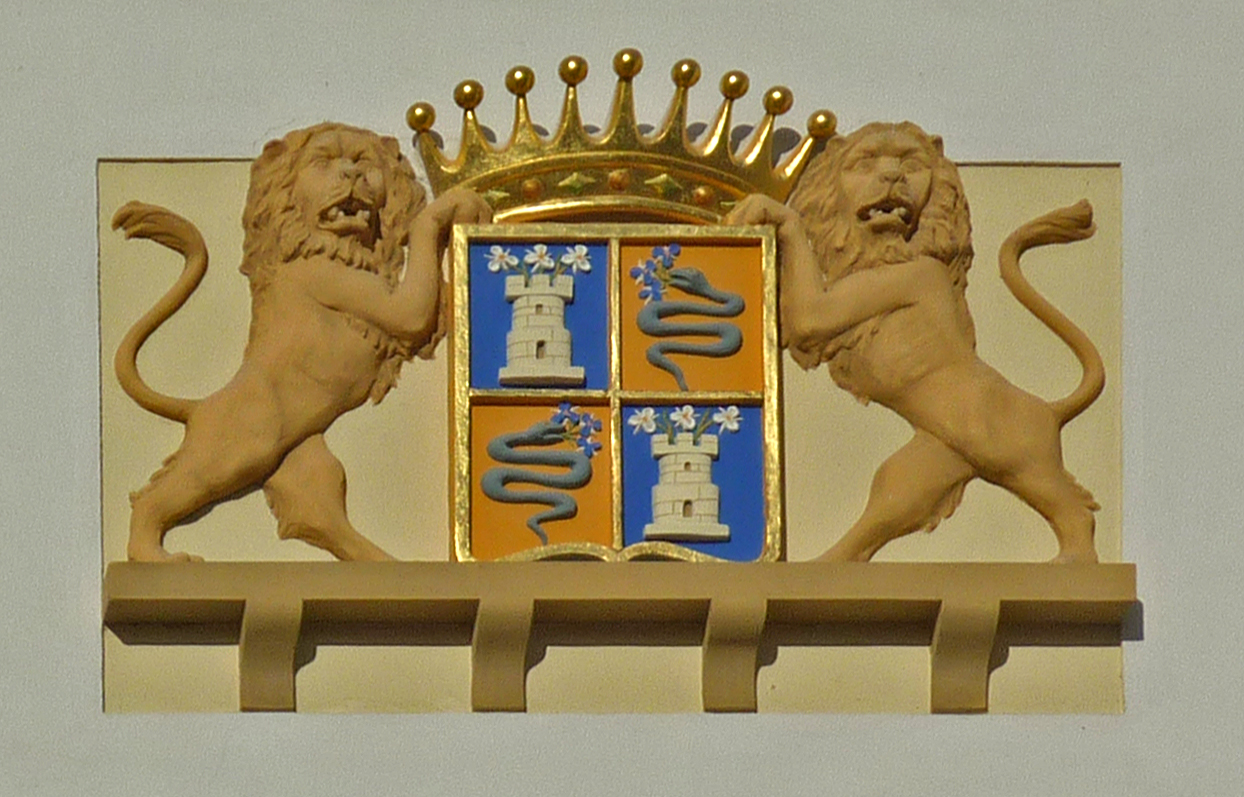 Lynar-Wappen am Schloss in Lübbenau